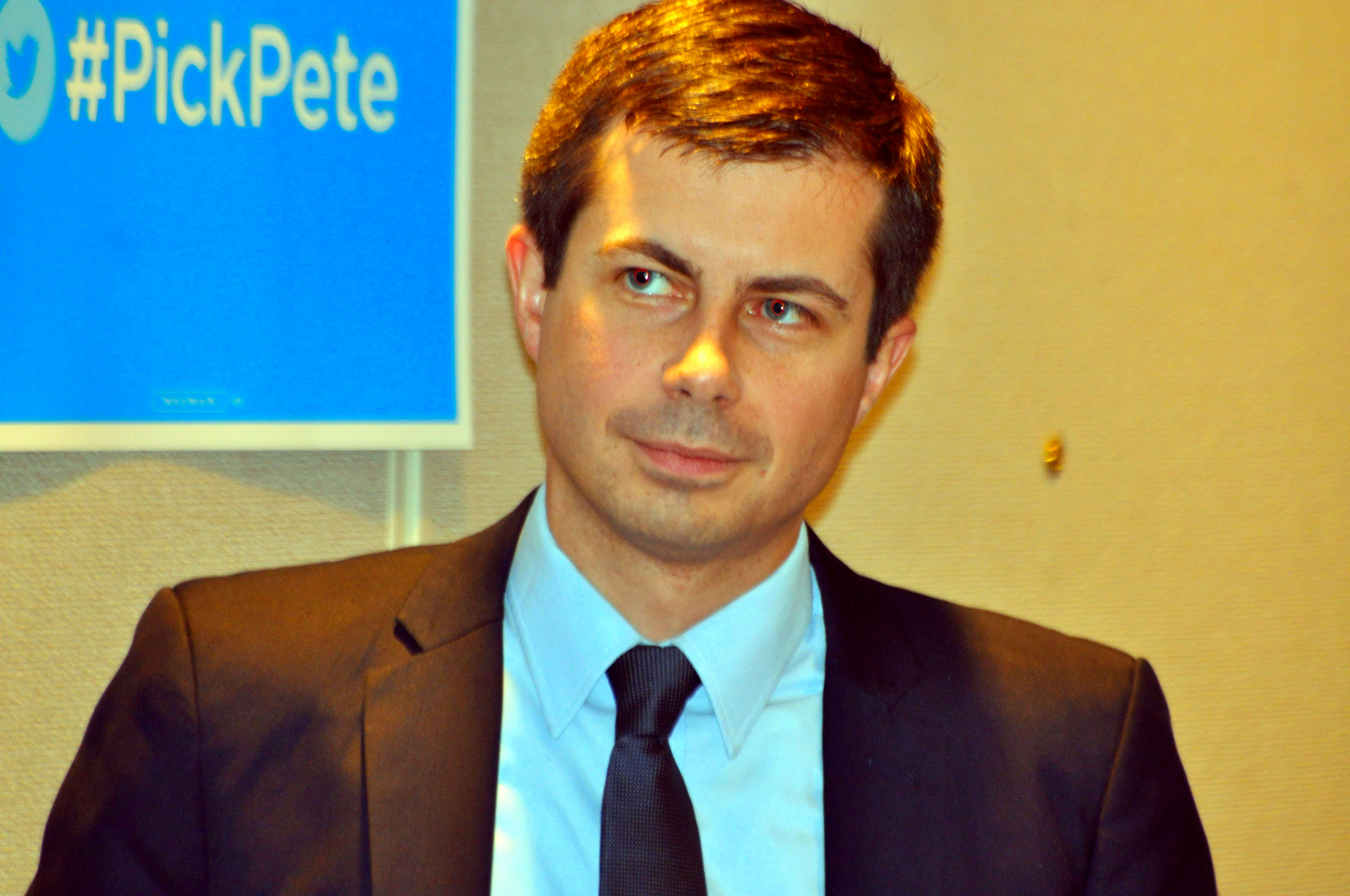 DNC Winter Meet 0063 'Pick Pete' Buttigieg